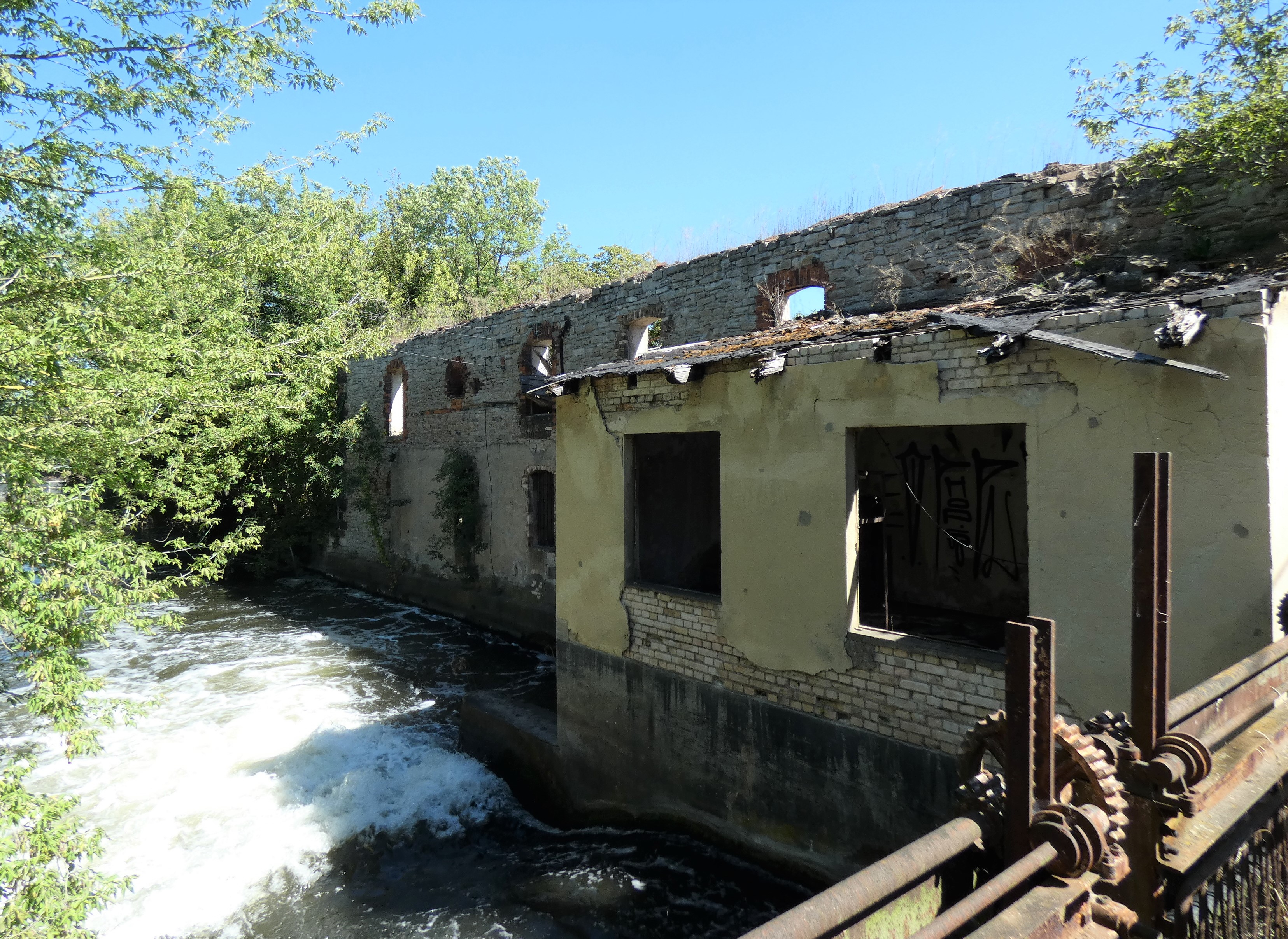 Alte Mühle in Döllnitz, Gemeinde Schkopau, Saalekreis